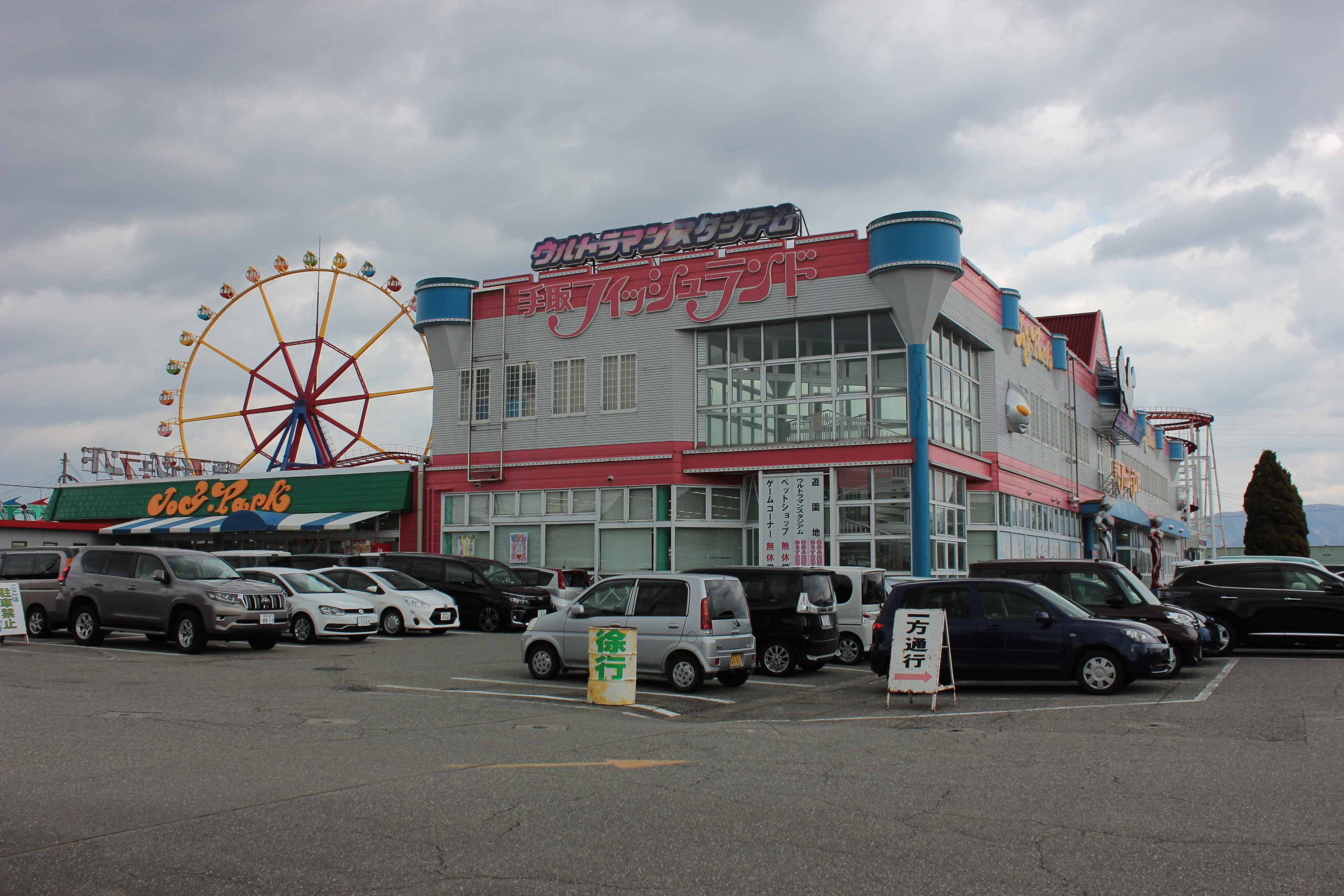 手取フィッシュランド（石川県能美市） Canon EOS Kiss X5